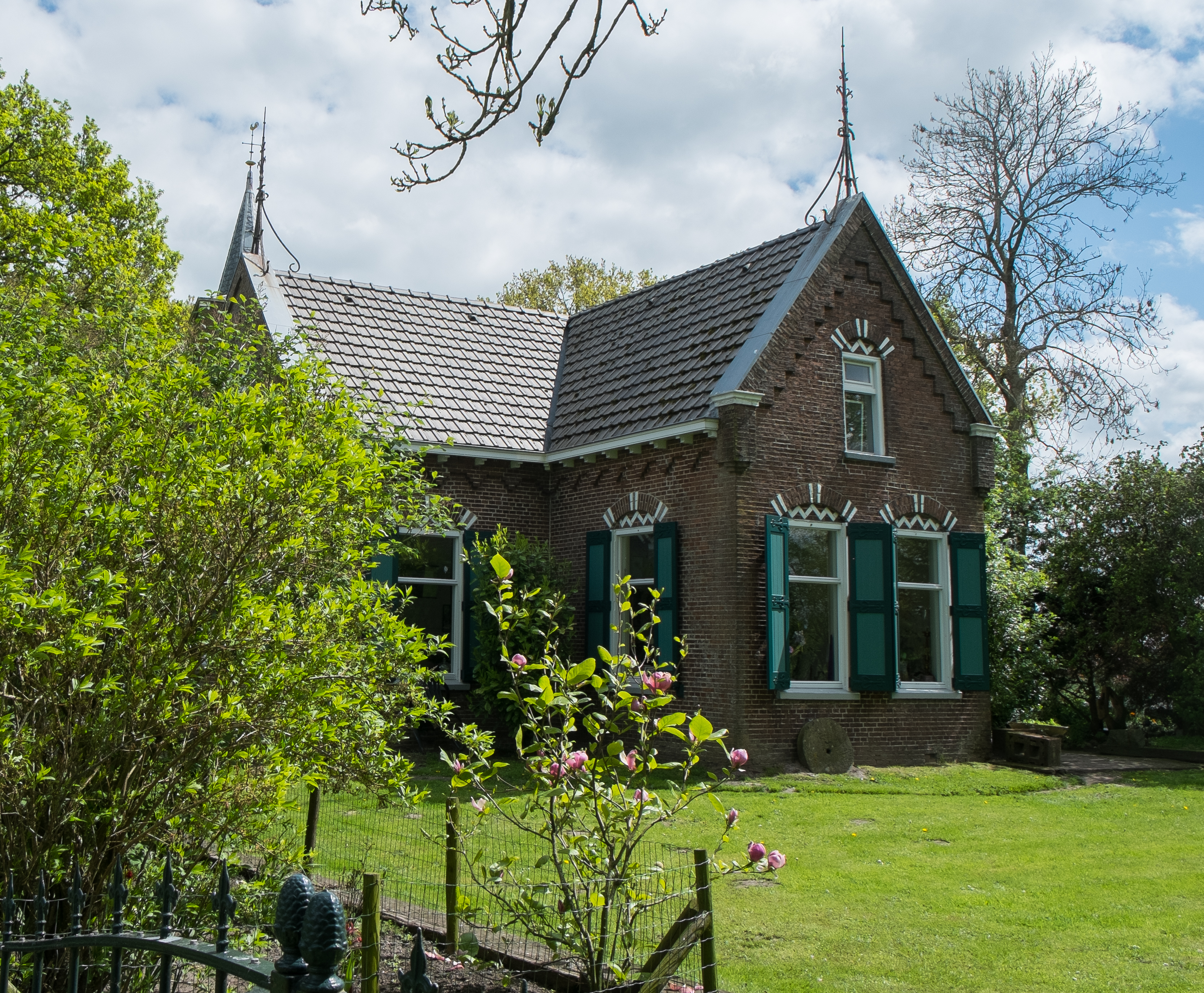 Voormalige pastorie van Augsbuurt.